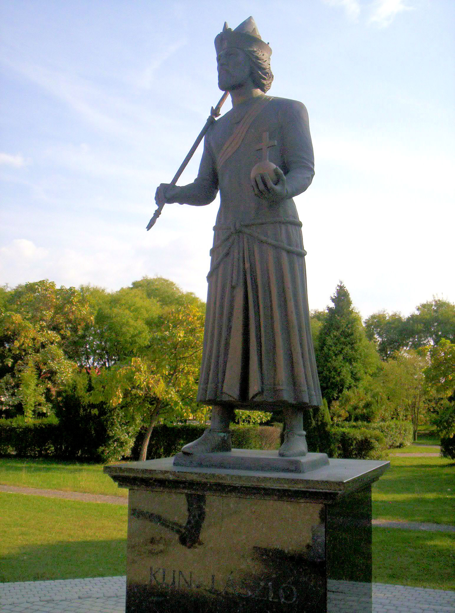 Kun László szobra Kiskunlacházán. Domonkos Béla alkotása – photo taken by uploader User:Csanády in 2006.